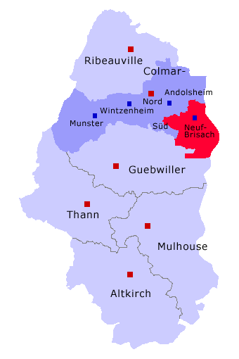 Lage von Kanton Neuf-Brisach im Arrondissement Colmar und im Département Haut-Rhin Selbst erstellt von Benutzer: Jeanfrance Juni 2006